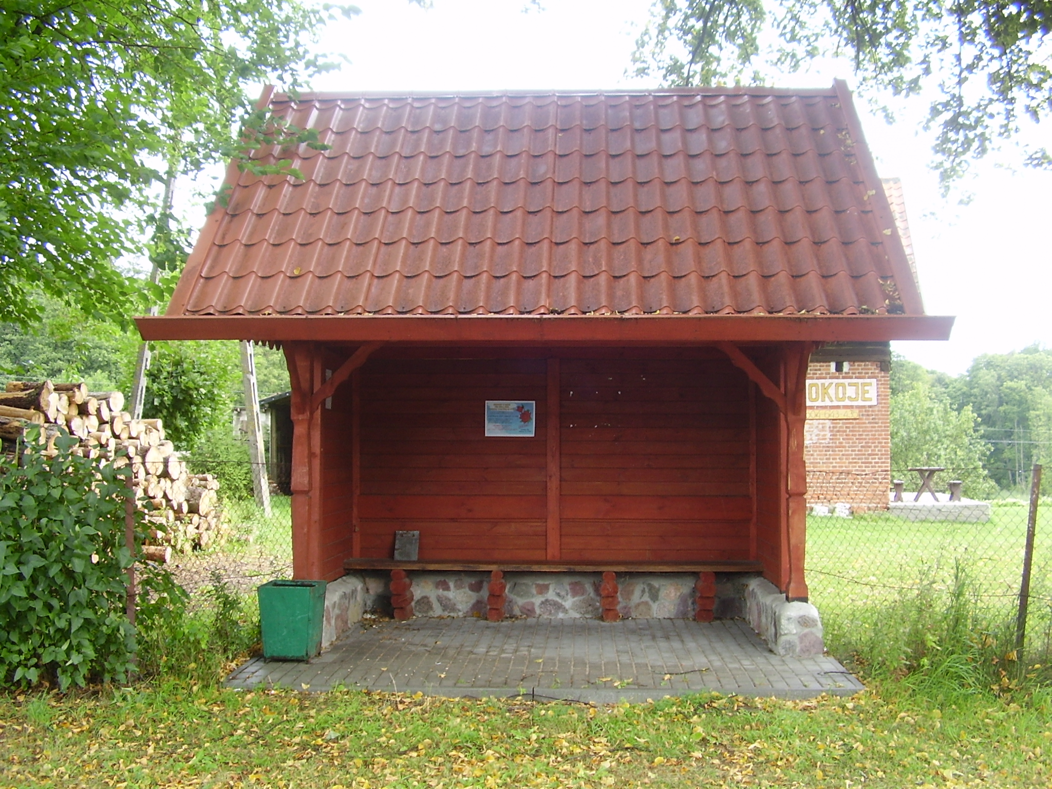 Przystanek autobusowy Rosocha sierpień 2012